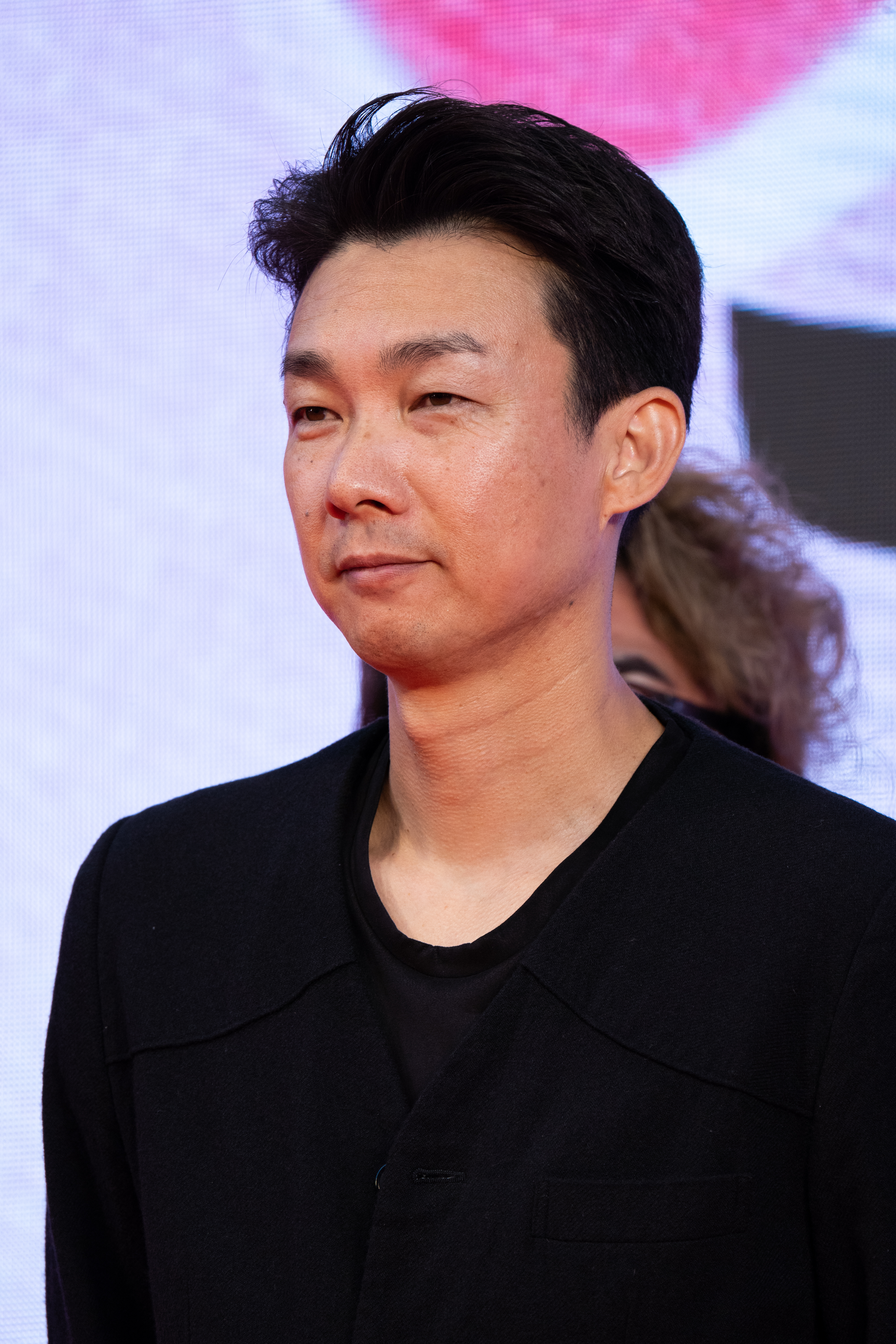 第32回 東京国際映画祭 オープニングセレモニー 松永大司 (その瞬間、僕は泣きたくなった)